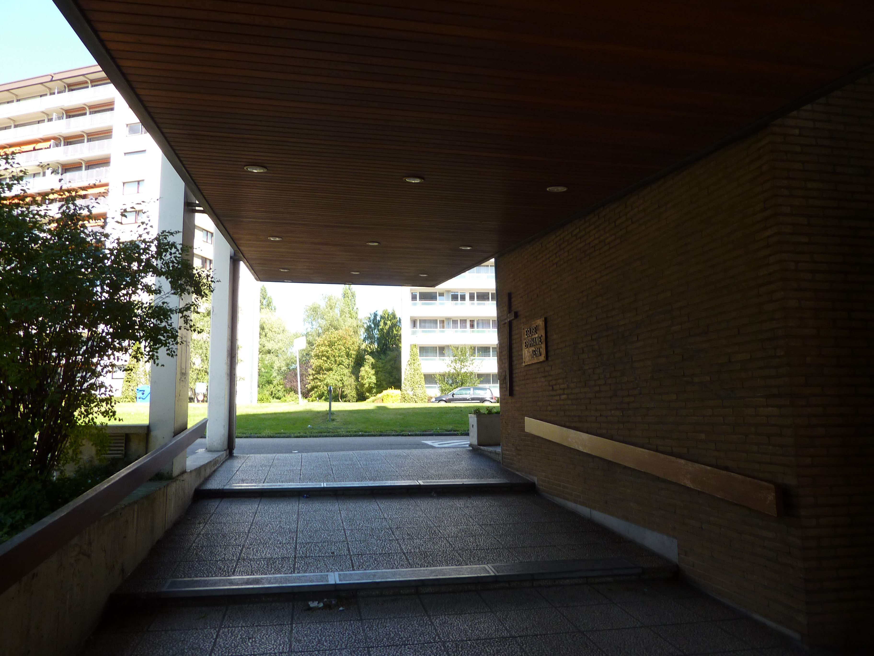 L'église de l'Épiphanie, rue de Genève à Schaerbeek, Bruxelles, Belgique.